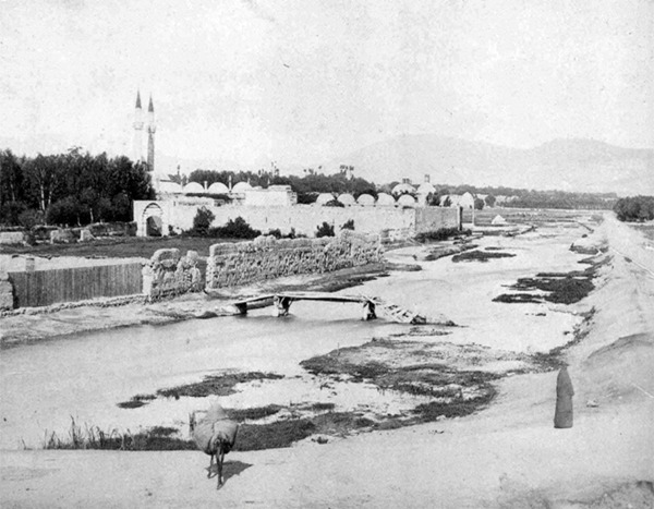 التكية السليمانية على ضفة نهر بردى جين بابيست شارلير 1868